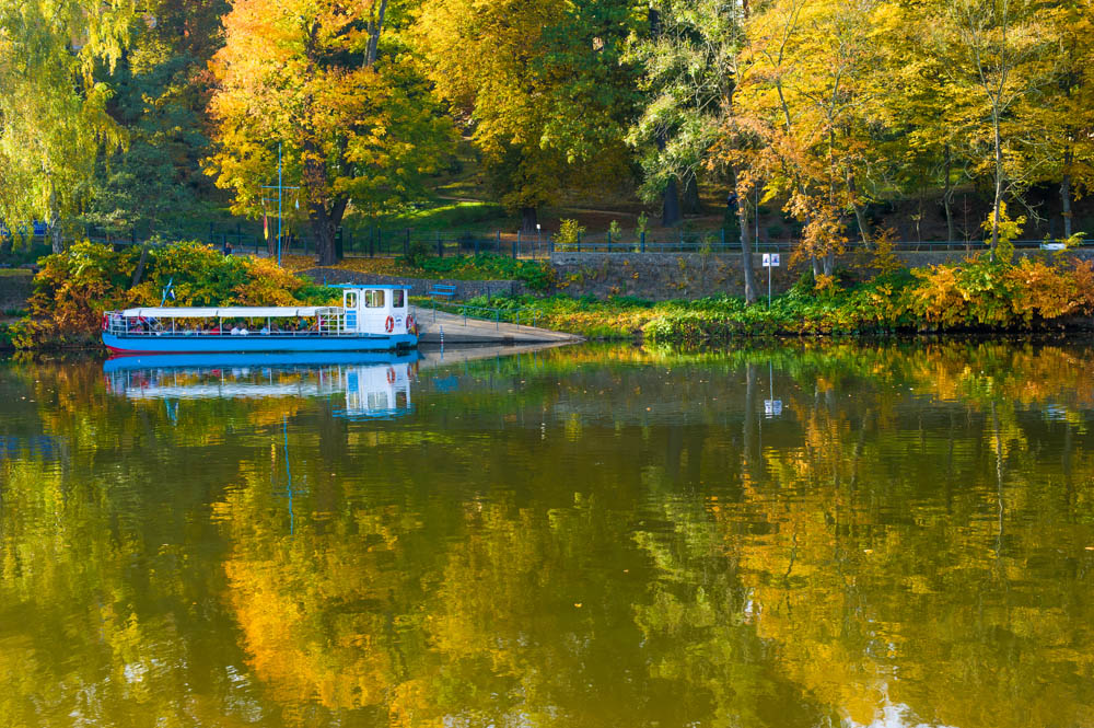 Muldenschifffahrt Grimma